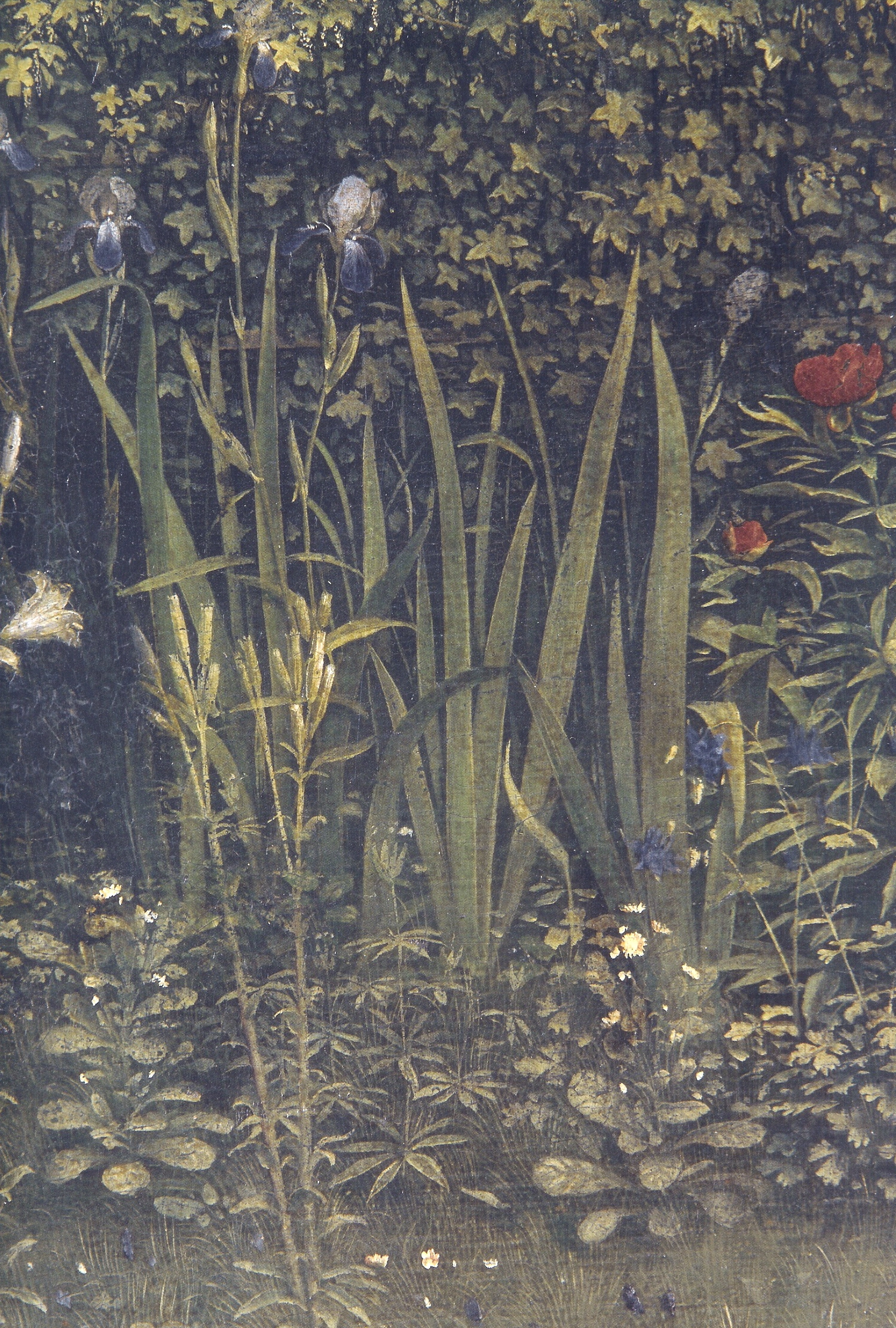 detail: nature - detail